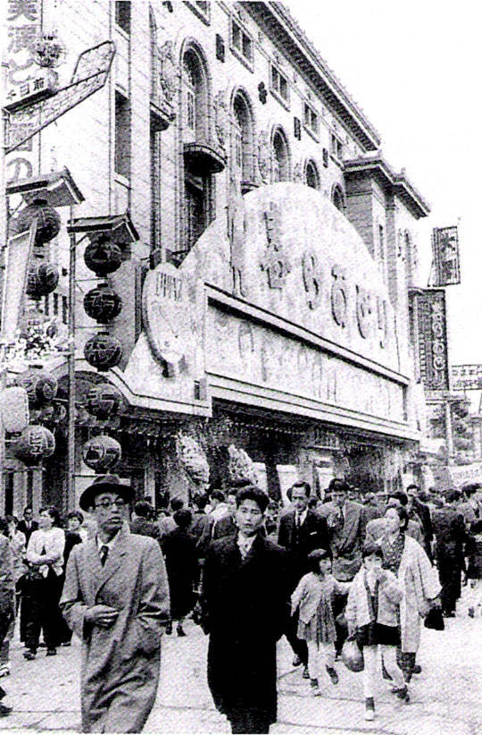 OSK「春のおどり」を上演中の大阪劇場（Osaka Theater）